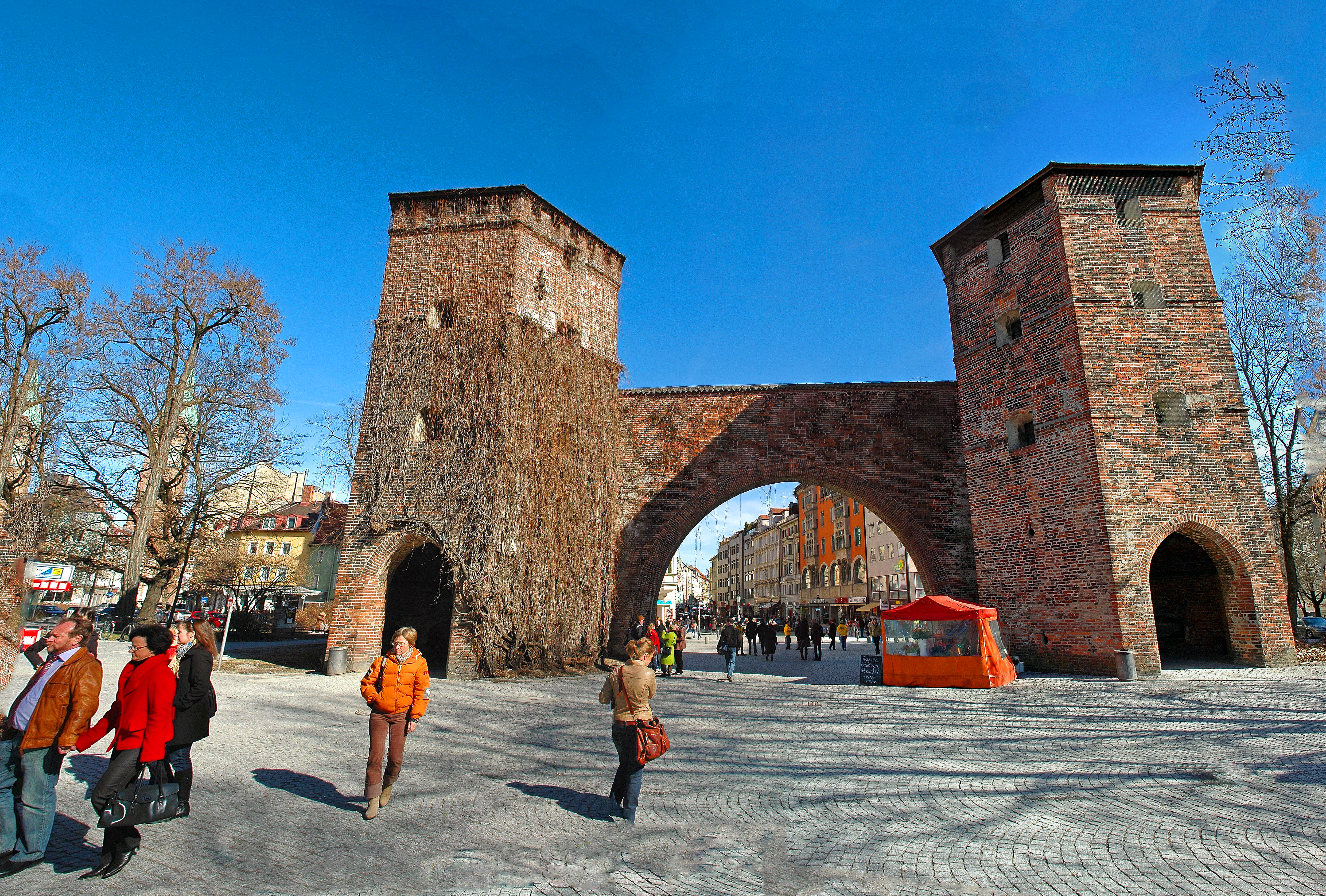 München, Sendlinger Tor vom Sendlinger-Tor-Platz (Panorama)